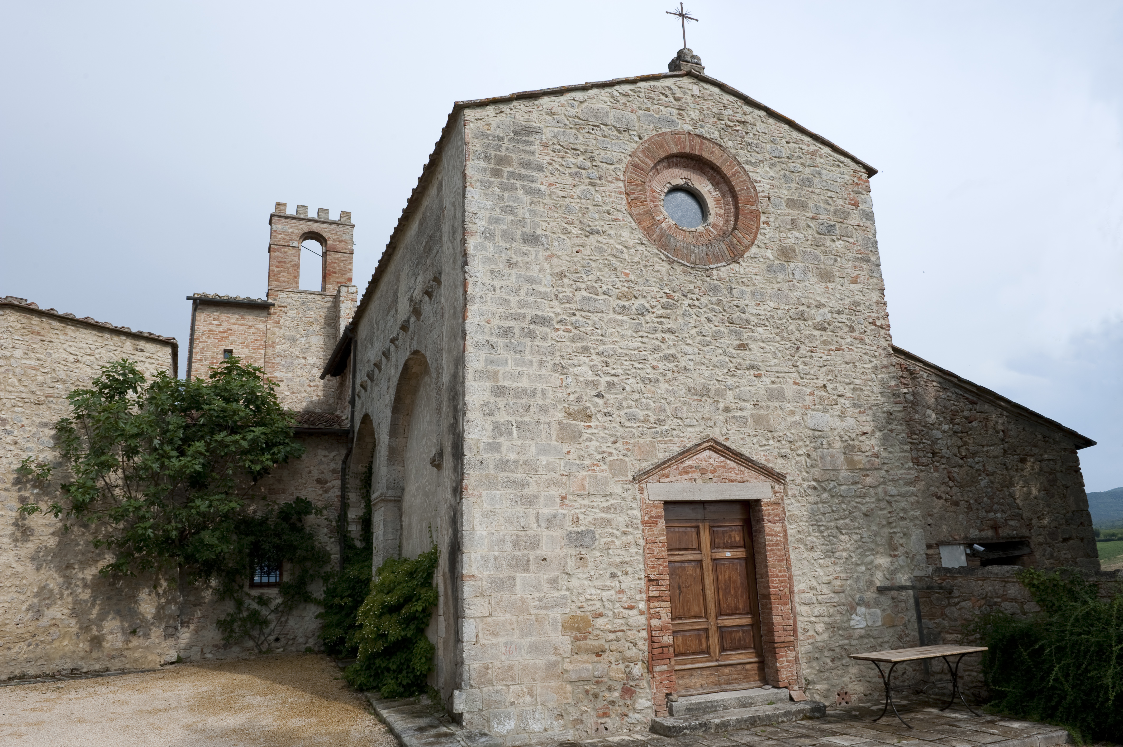 Facciata della Pieve di Santa Maria a Castello (Monteriggioni)